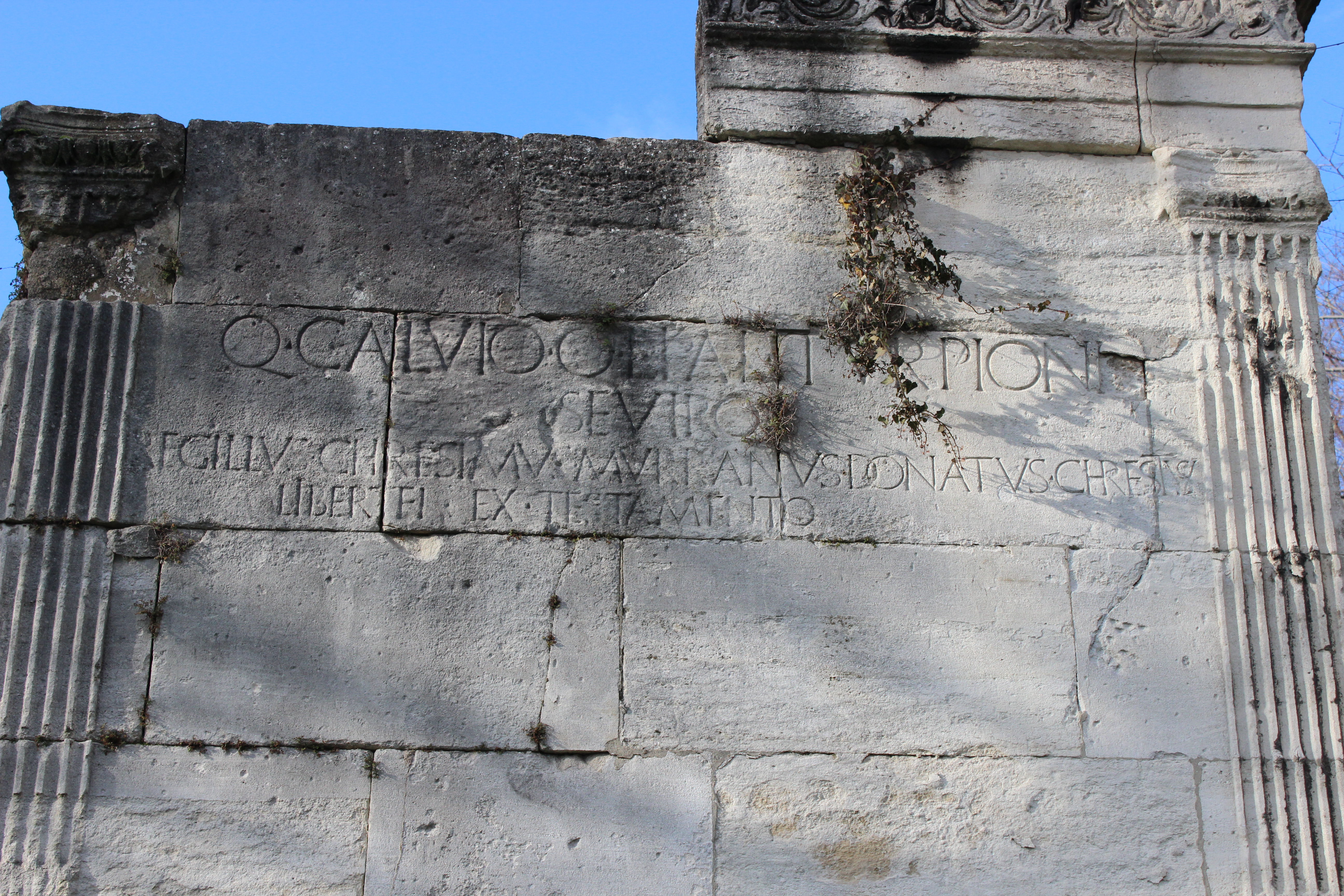 Mausolée de Turpion, quartier de Trion à Lyon.